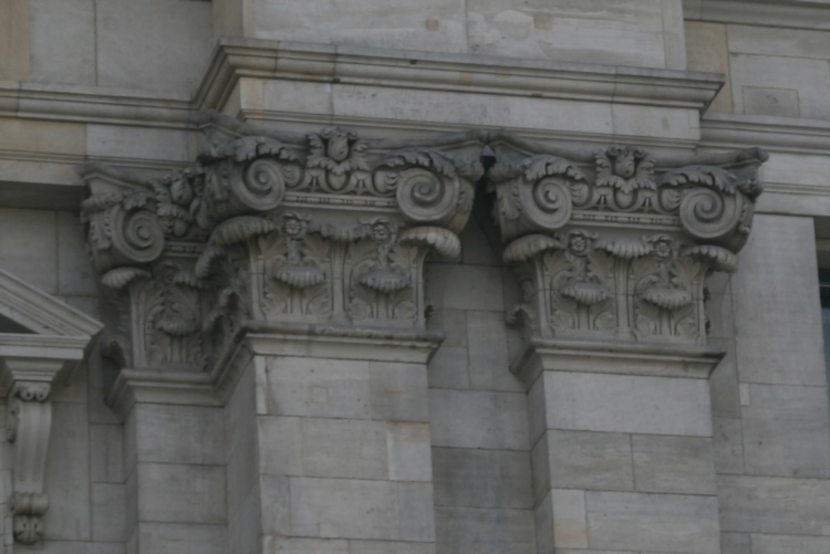 Reichstagsgebäude - Nordansicht ( Mitte ) Mittelportal - Wandpfeiler - Links vom Reichstagufer Sitz - Deutscher Bundestag Baudenkmal ( LDA ) Landesdenkmalamt - Berlin Dok Nr. 09050341 LDA Info wiki Reichstagsgebäude